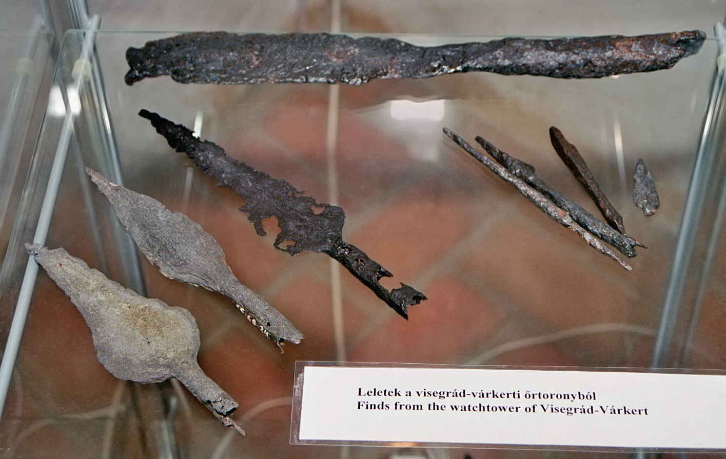 Visegrád-Várkert (Burgus Solva 26), Ungarn: Zwischen 1962–1963 ist am Fuß des Sibrik-Berges ein Limeswachturm ergraben worden, der 270 endgültig zerstört wurde. Von dort stammen die hier gezeigten Waffen. Aufgenommen während der provinzialrömischen Sonderausstellung „Visegrád évszázadai – A római kor kezdete a Dunakanyarban“ die vom 19.08.2011 bis 20.07.2012 im Mátyás Király Múzeum (König-Matthias-Museum), Visegrád, stattfand.